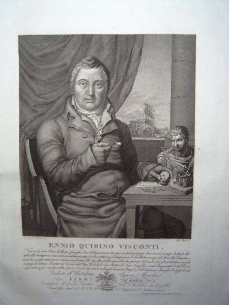 Identificazione: Ritratto di Ennio Quirino Visconti Autore: Rados Luigi (1773/ 1844), incisore; Capitani Tirsi (notizie sec. XIX prima metà), disegnatore Cronologia: ca. 1828 Oggetto: stampa Soggetto: ritratto Materia e tecnica: acquaforte; maniera a granito Misure: 371 mm. x 493 mm. (battuta della lastra) Misure: 292 mm. x 343 mm. (Parte incisa) Notizie storico-critiche: La datazione proposta si basa sull'analogia stilistica e d'impostazione che esiste fra la stampa qui catalogata e la stampa I01674 che è datata in lastra 1828. Stampa ritrovata l'8 gennaio 2001 nei cassetti segreti delle bacheche dei minerali di proprietà della Fondazione.